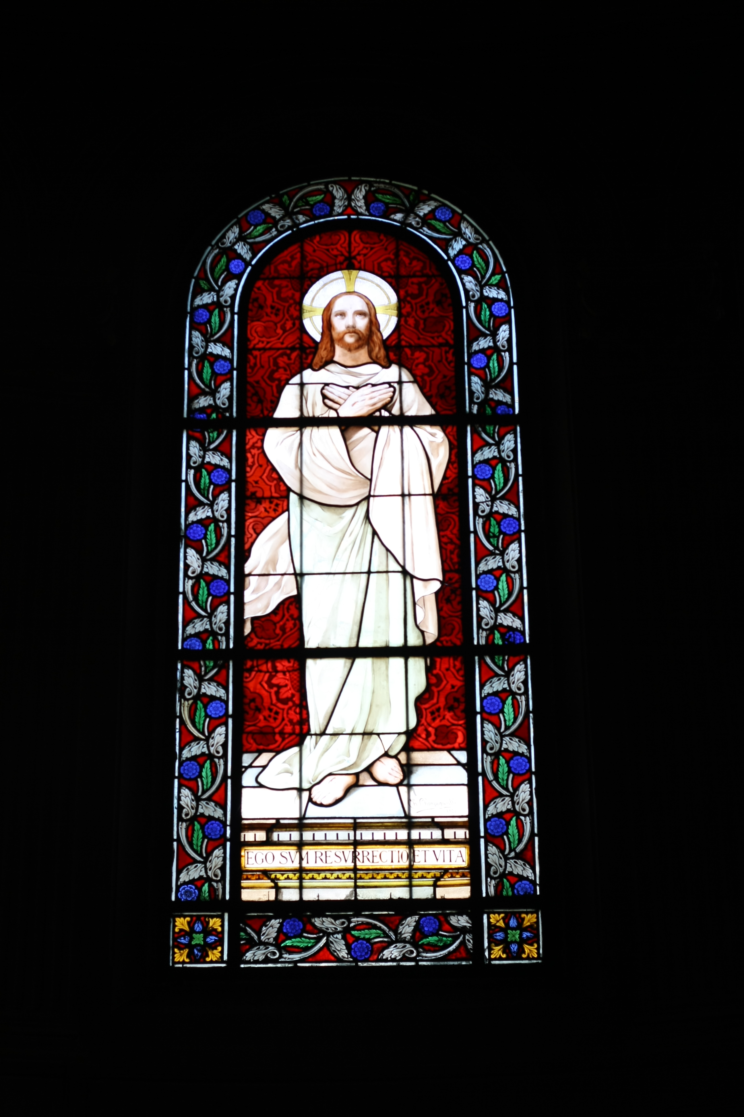 Bleiglasfenster im Chor der Kirche Saint-Jacques-Saint-Christophe de la Villette in Paris, Darstellung: Jesus, Inschrift: "EGO SUM RESURRECTIO ET VITA" (Ich bin die Auferstehung und das Leben)